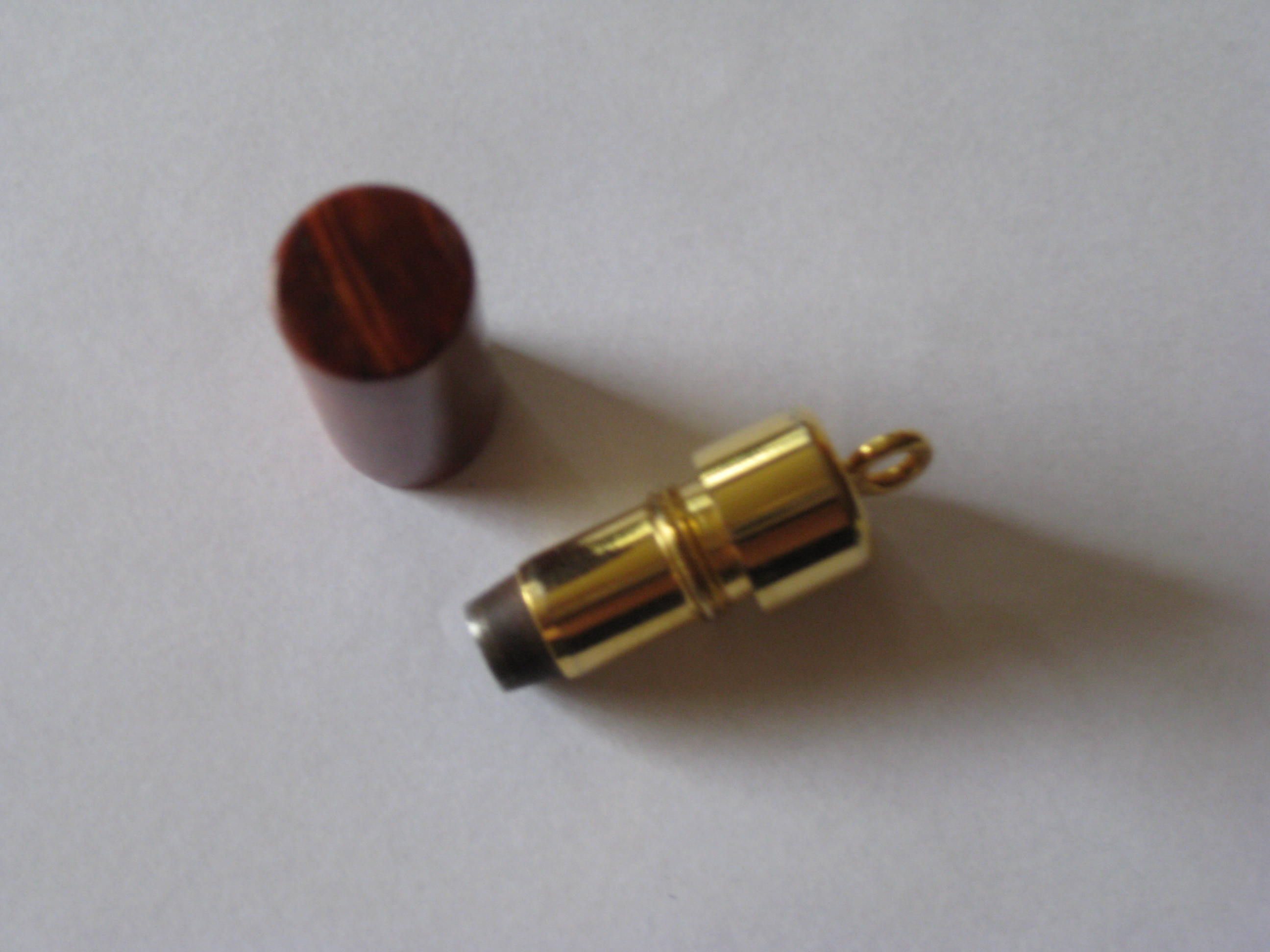 Sigarenboor